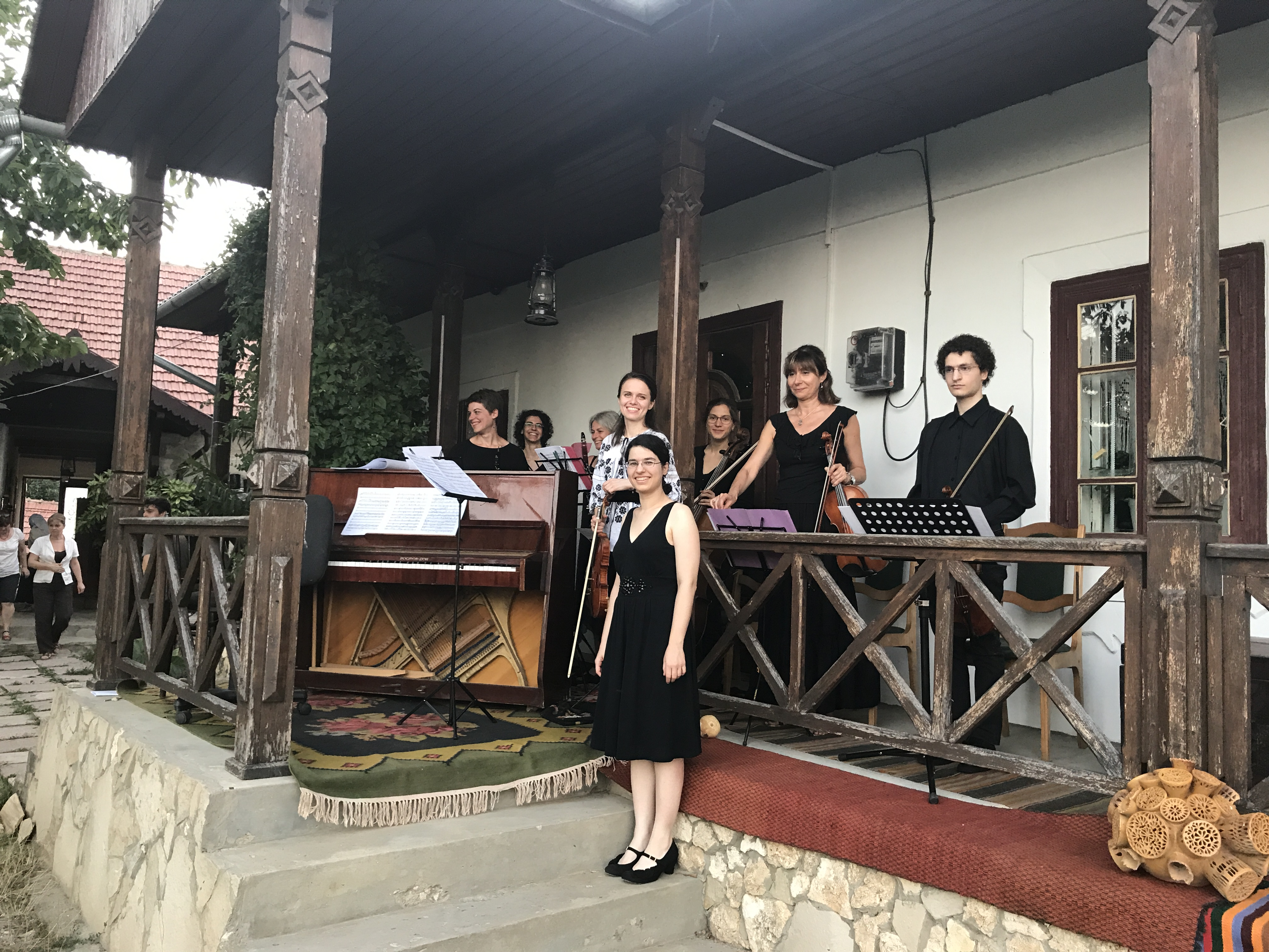 Les premiers concerts de musique classique vivante (moldave) dans un nombre de villages de la République de Moldavie, offerts par des musiciens du monde entier.